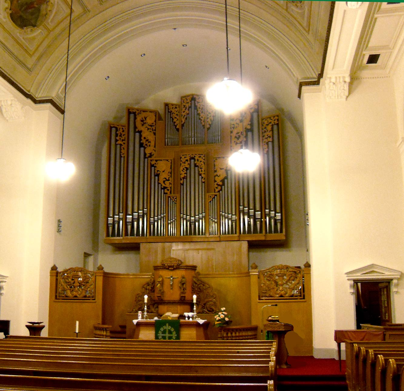 Evangelische Dankeskirche in Benrath, Düsseldorf